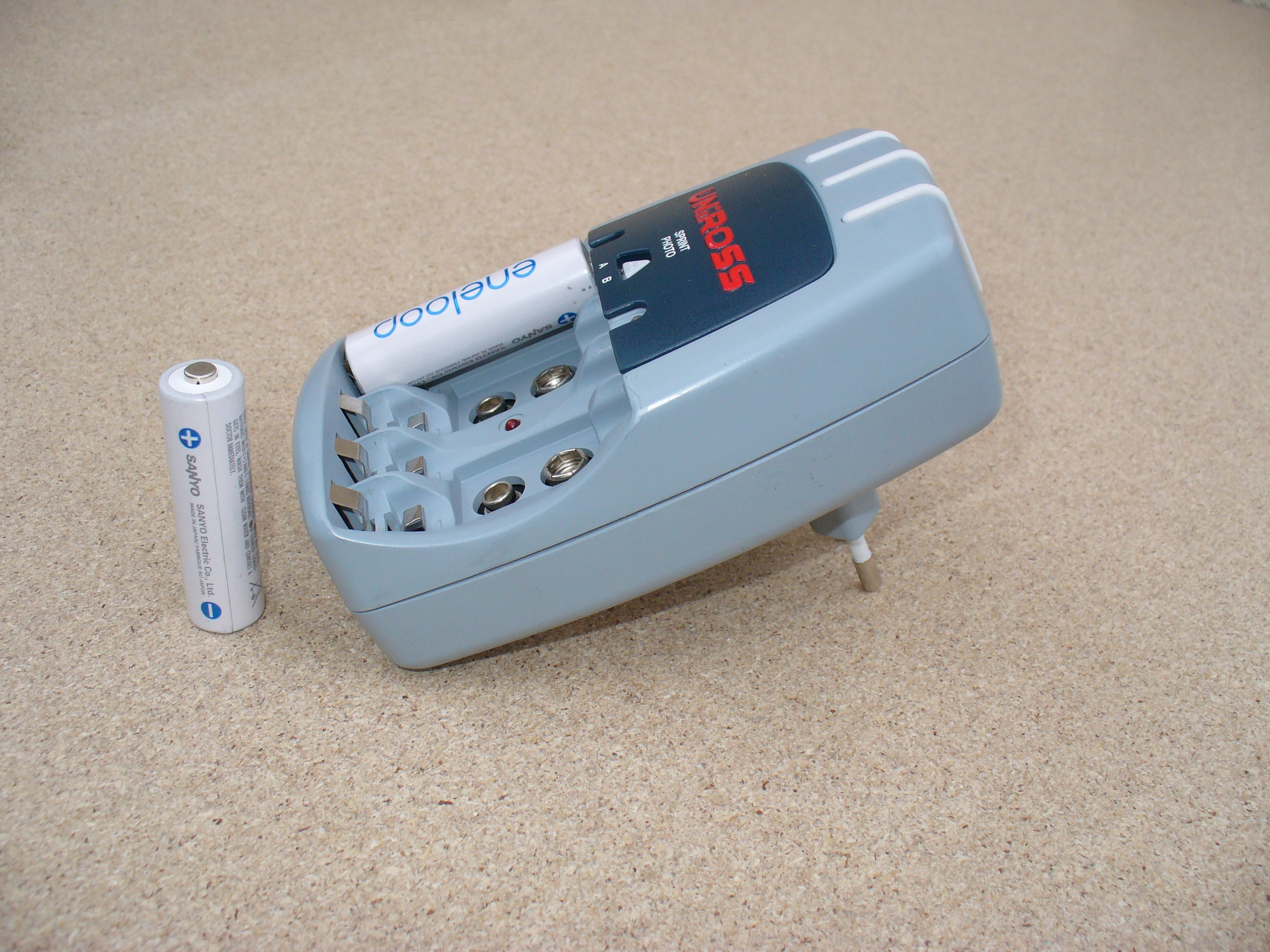 UniRoss Steckerlader für 4x AA (Mignon) Akkumulatoren